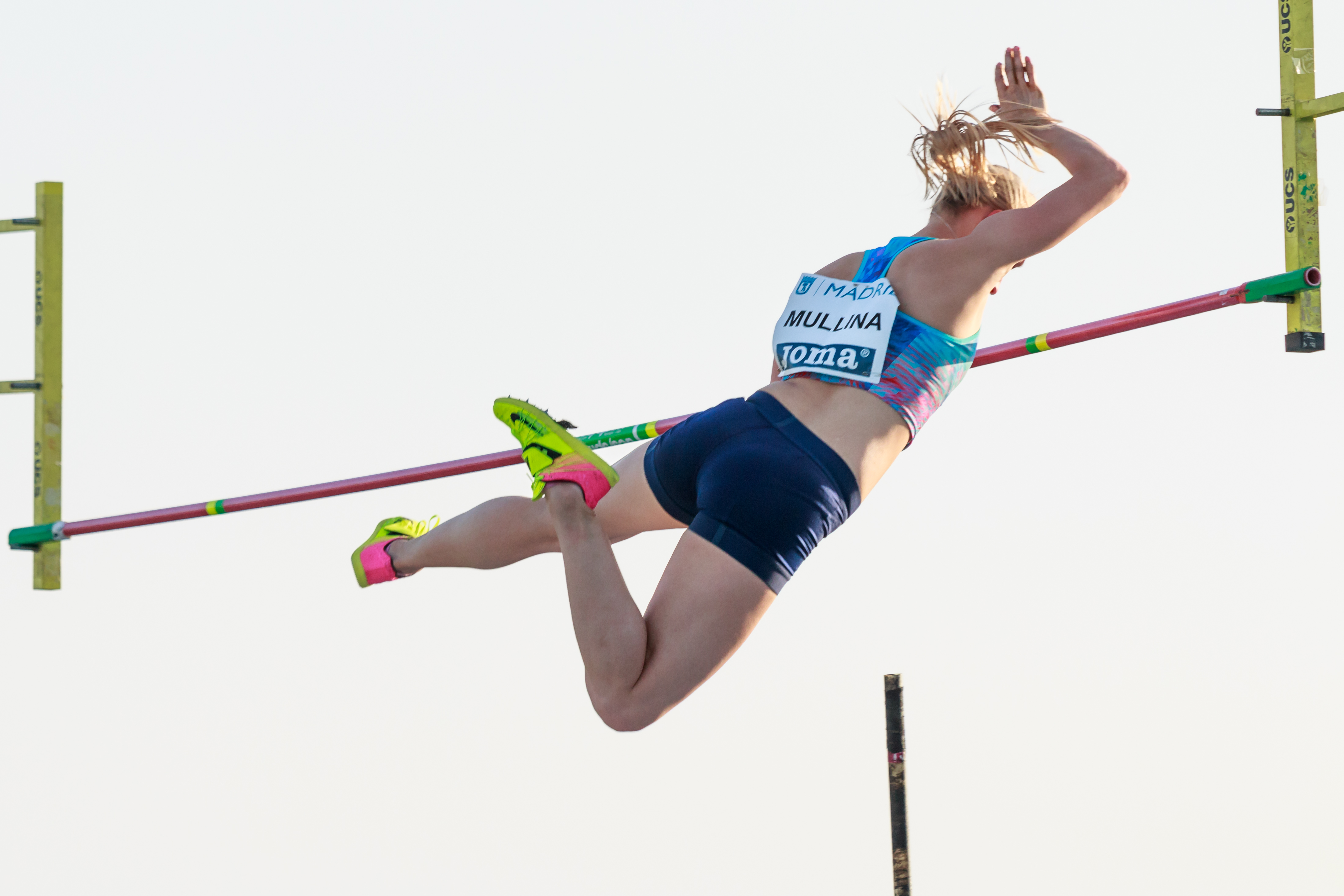 Olga Mullina (ANA). Salto con garrocha. IAAF World Challenge. Meeting Madrid 2017. Moratalaz, Madrid.